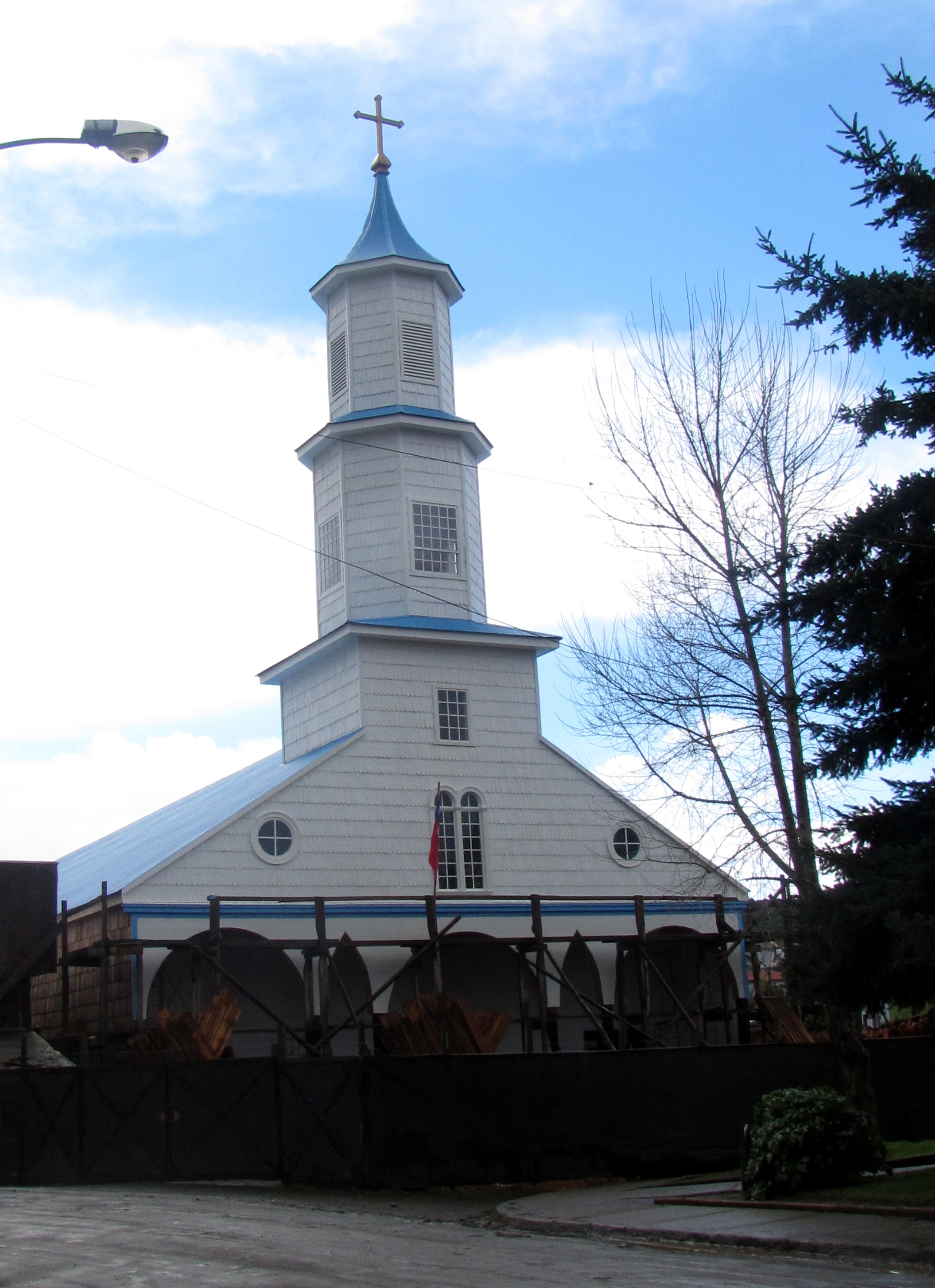 Iglesia Santa María, Rilán, comuna de Castro, archipiélago de Chiloé, Chile This is a photo of a national monument in Chile: 162